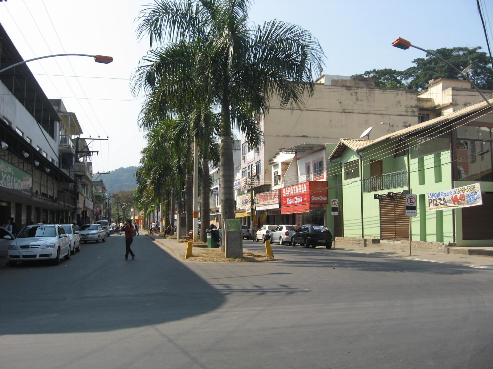 Vista de Paracambi.